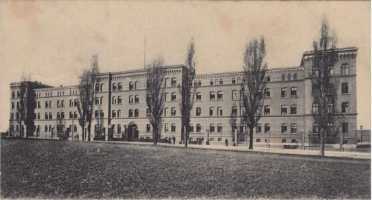 Die Neue Kaserne in der einstigen Görlitzer Oststadt (heute: Zgorzelec)